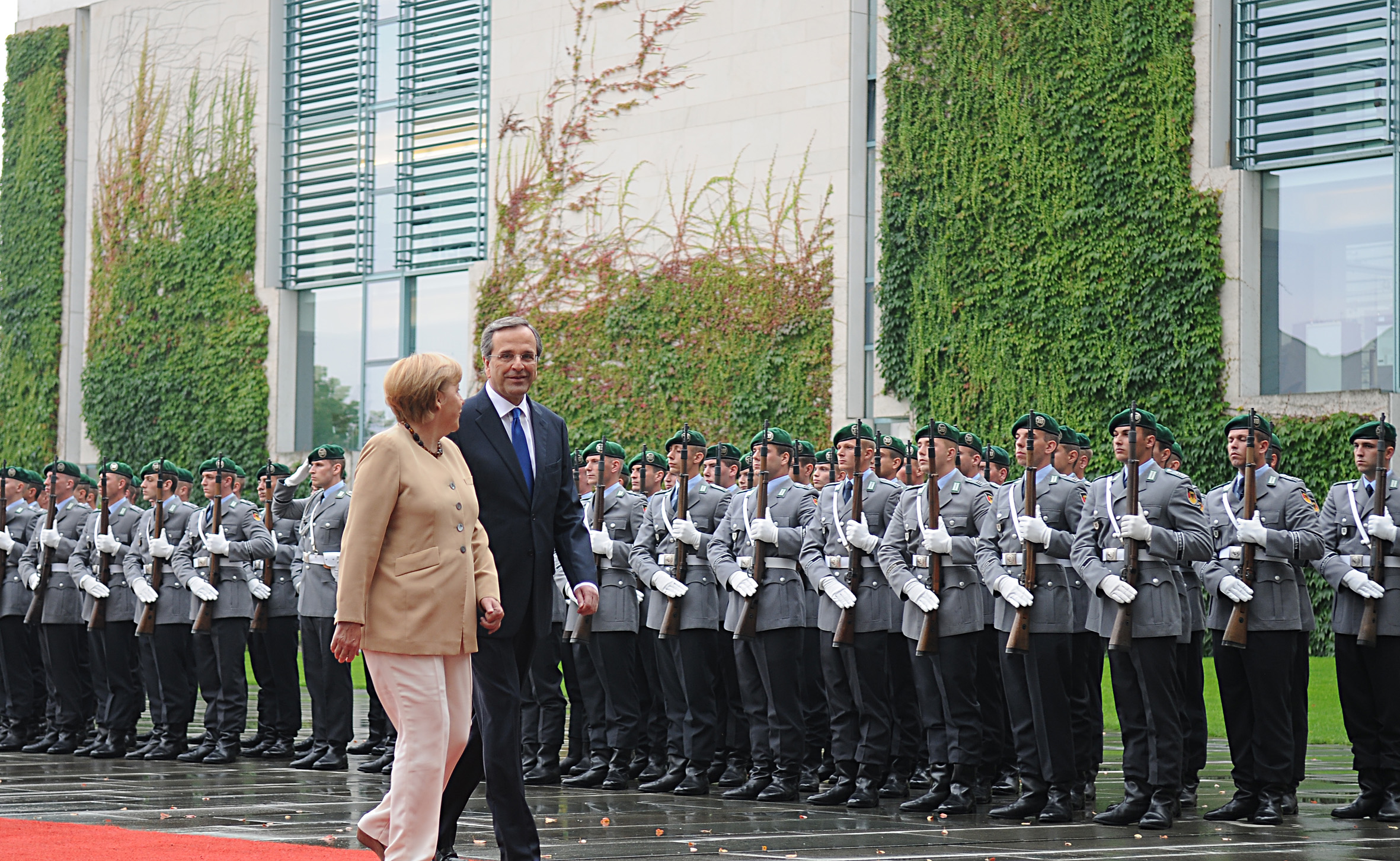 Συνάντηση Σαμαρά Μέρκελ στο Βερολίνο